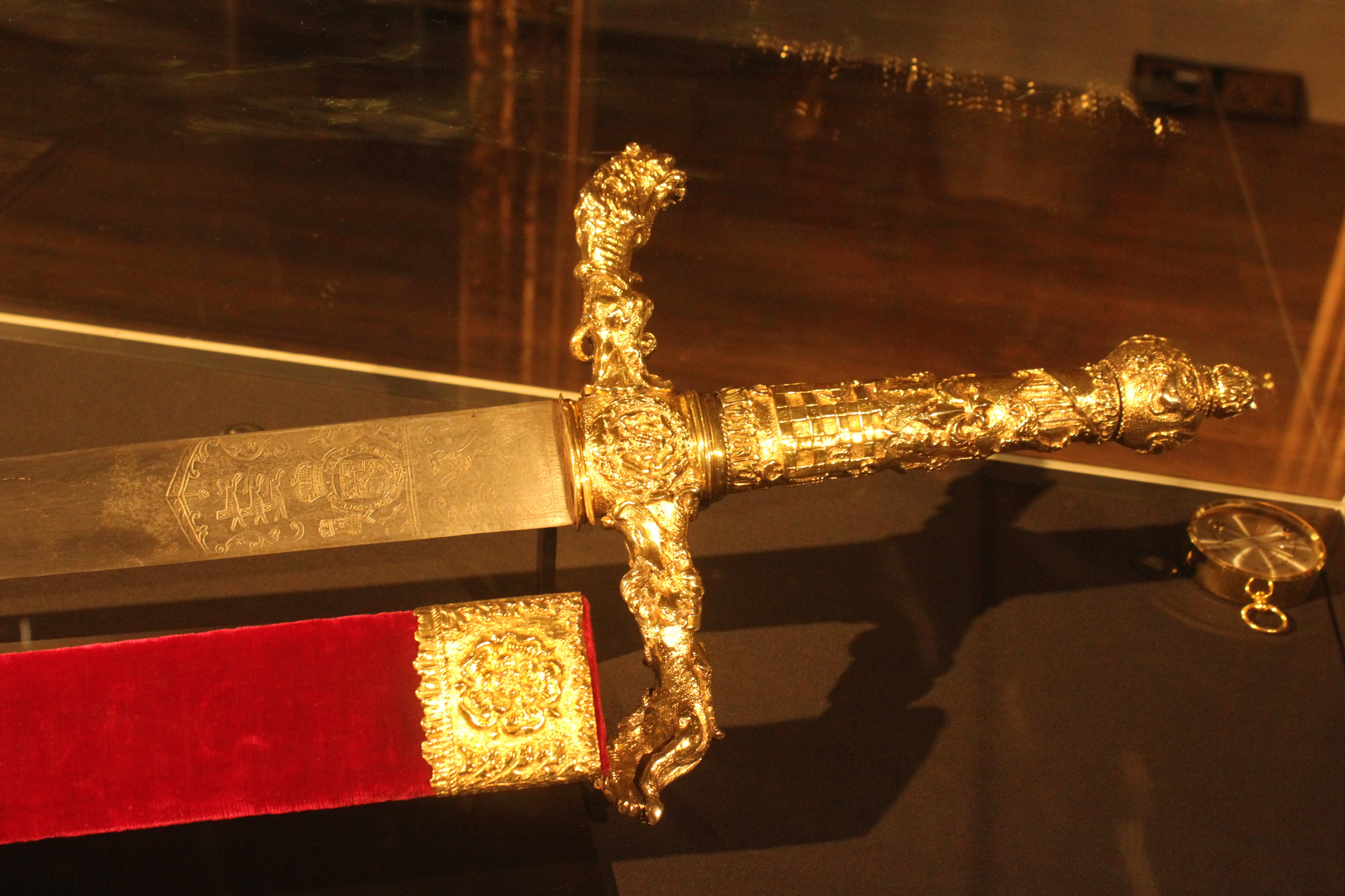 Het ceremoniële zwaard van Lord Lieutenants van Ierland